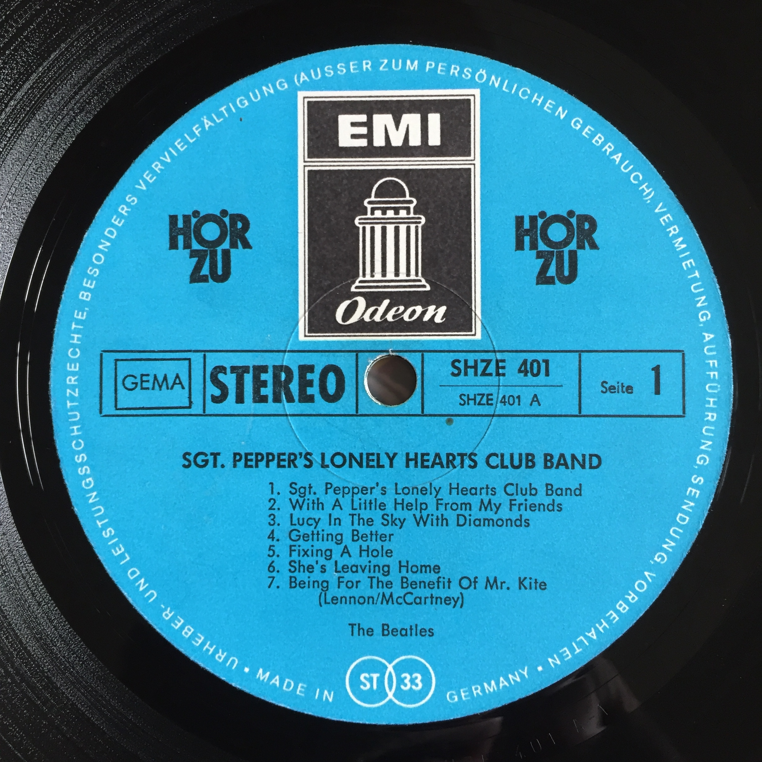 Label der deutschen Ausgabe der LP Sgt. Pepper (Beatles)